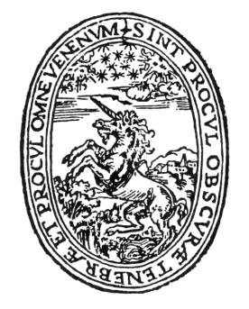 Marca tipografica utilizzata dalla tipografa italiana Giromala Cartolari tra 1546 e 1559